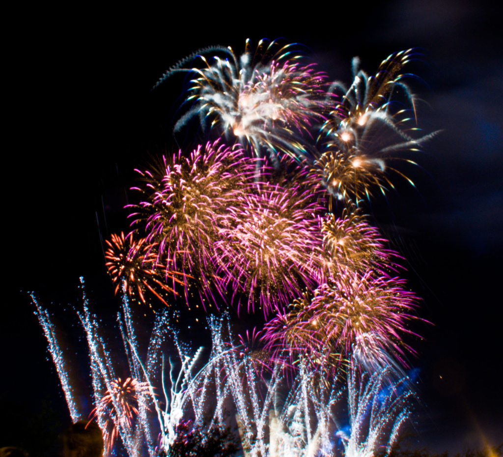 Clausura del Forum 2007 - Fuegos Artificiales, Monterrey, Mexico.